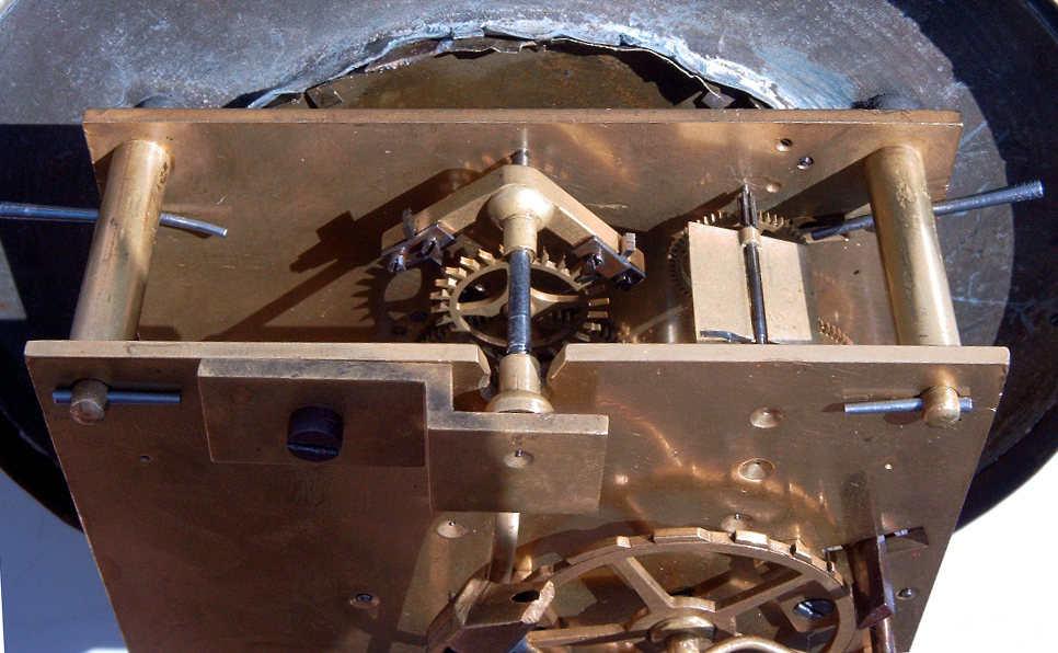 Aufsicht auf den oberen Teil eines Uhrwerks (Baujahr ca. 1880)